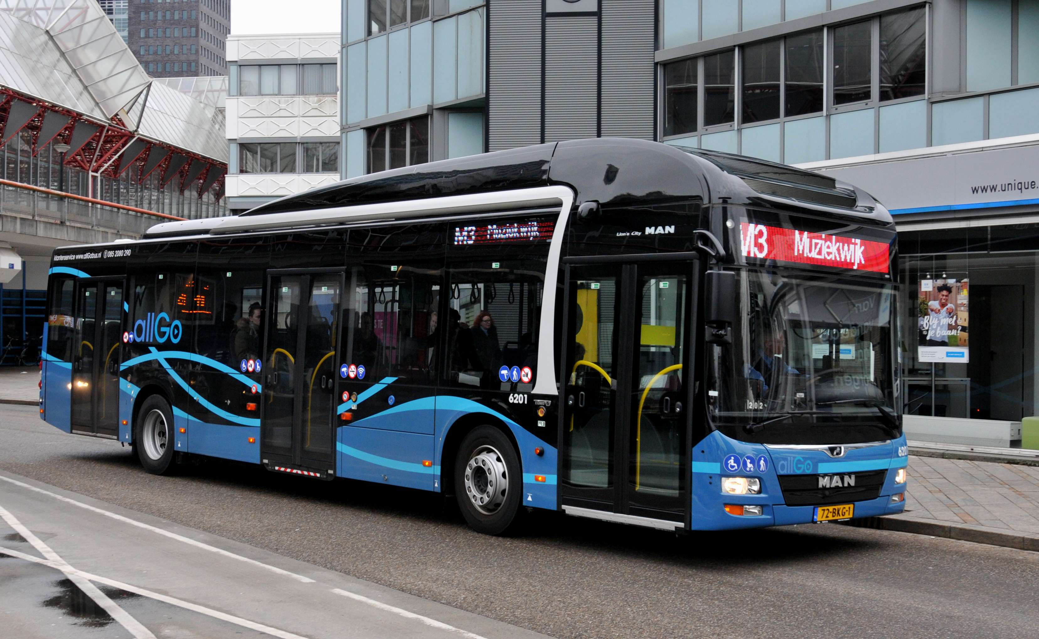 Keolis Nederland bus 6201 van het type MAN Lion City A37 LF te Almere.